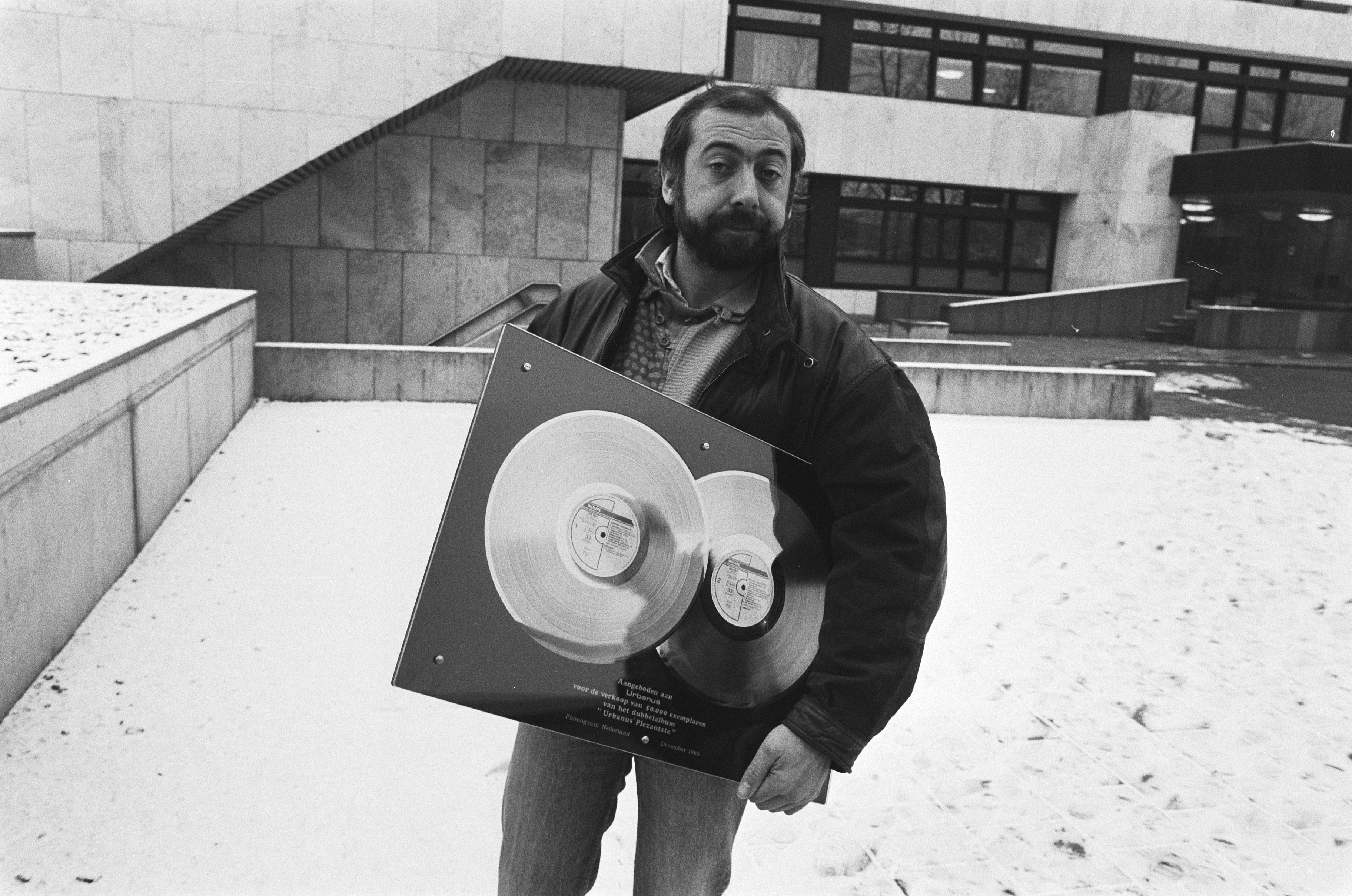 Collectie / Archief : Fotocollectie Anefo Reportage / Serie : Urbanus verlaat het NOS-gebouw met de zojuist ontvangen gouden plaat Beschrijving : Urbanus met zijn gouden plaat onder de arm (voor het album Plezantste) Datum : 30 december 1985 Locatie : Hilversum Trefwoorden : artiesten, sneeuw, trofeeën Persoonsnaam : Servranckx, Urbain , Urbanus Fotograaf : Bogaerts, Rob / Anefo, [onbekend] Auteursrechthebbende : Nationaal Archief Materiaalsoort : Negatief (zwart/wit) Nummer archiefinventaris : bekijk toegang 2.24.01.05 Bestanddeelnummer : 933-5241